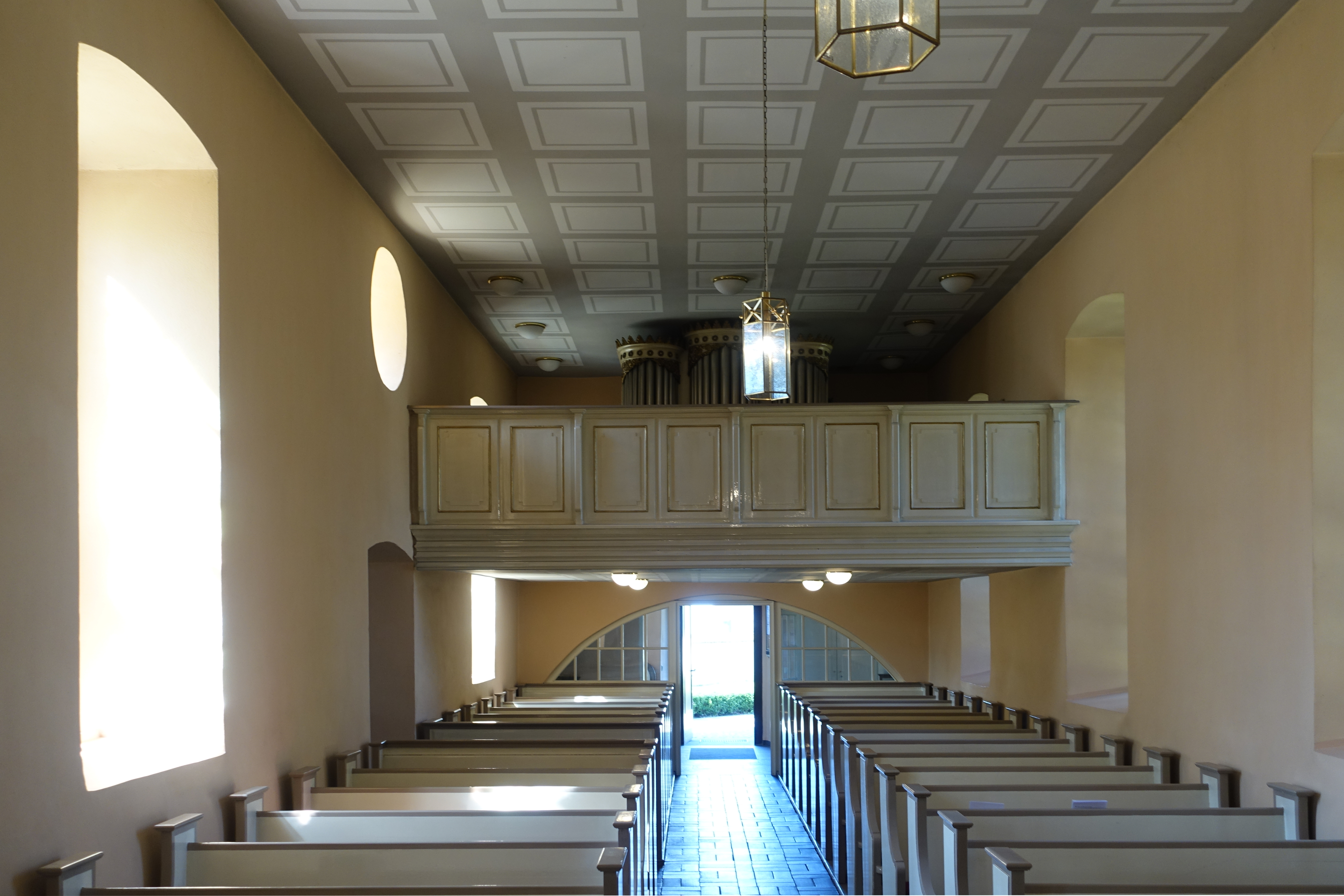 Kirchraum mit Blick in Richtung Eingang